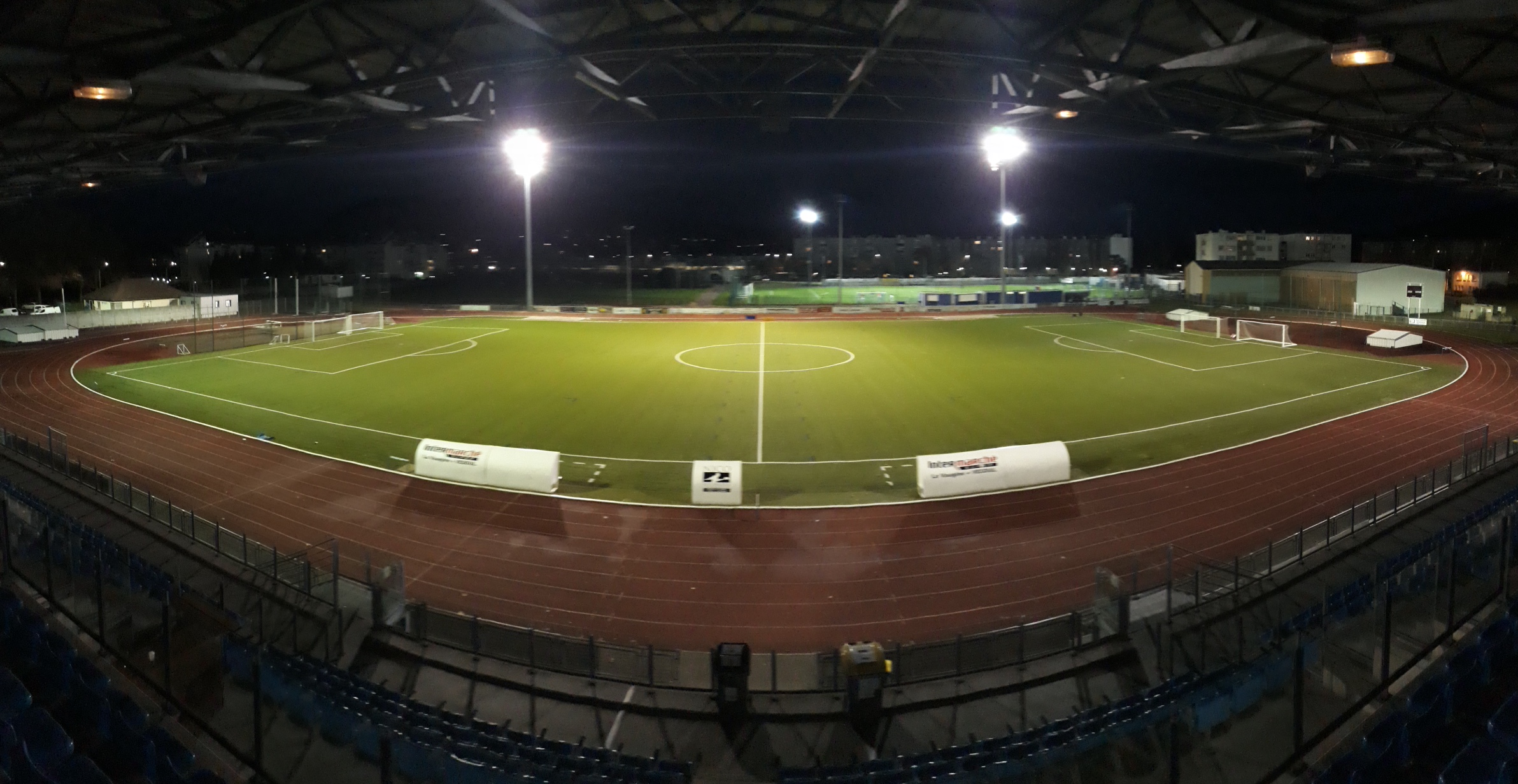 Stade René-Hologne de Vesoul - 27 novembre 2019